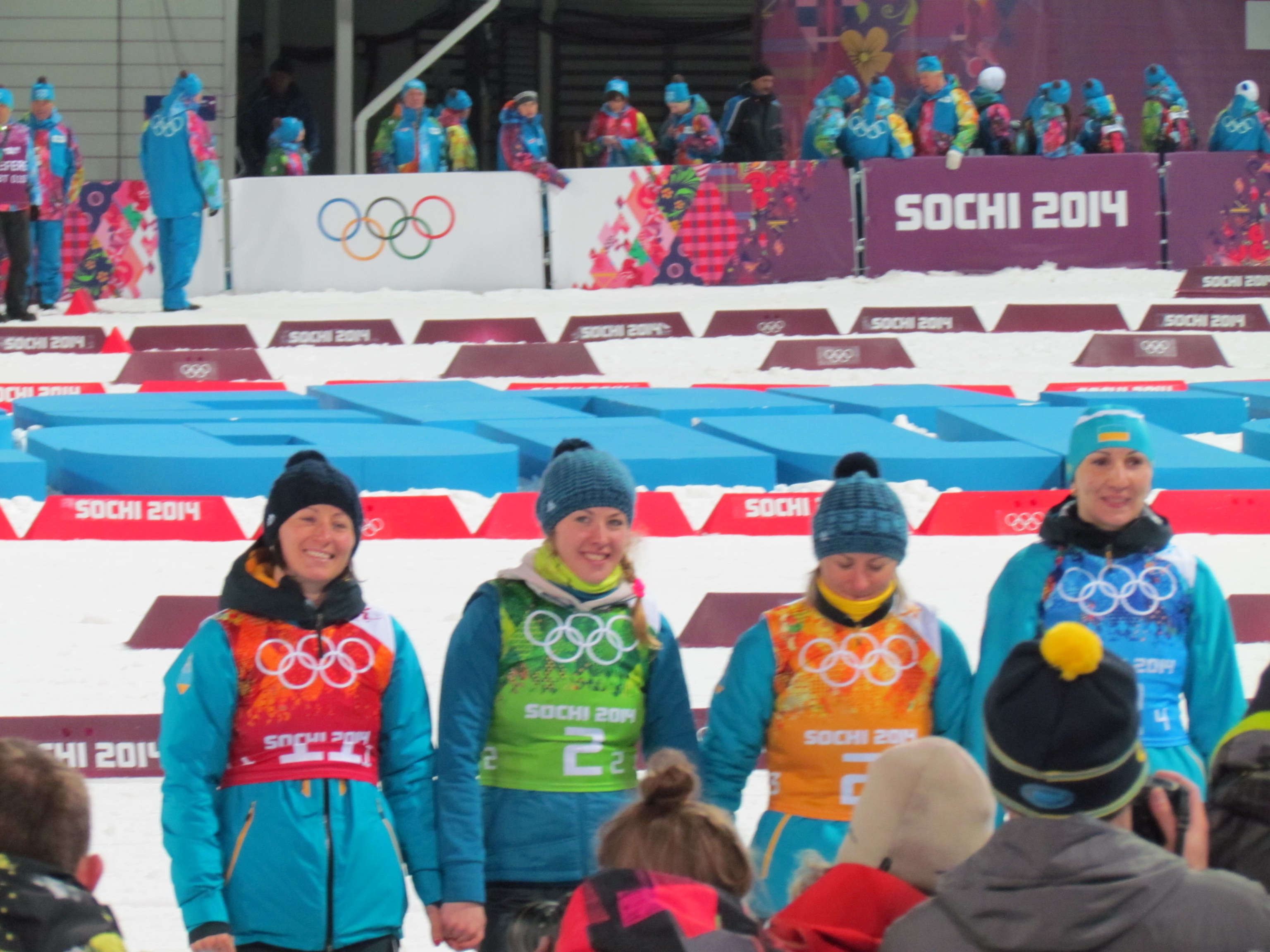 Зимові Олімпійські ігри 2014. Біатлон, жіноча естафета. Квіткова церемонія